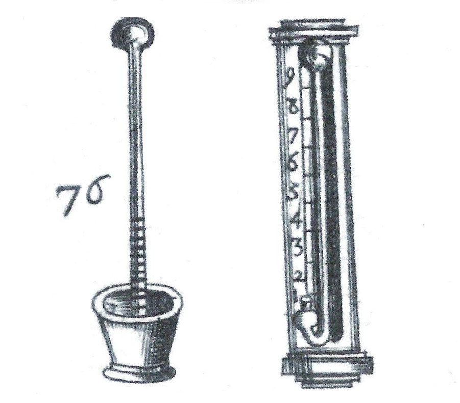 Figure extraite d'une planche du livre "Récréation Mathématicque, publié par Jean Leurechon en 1626